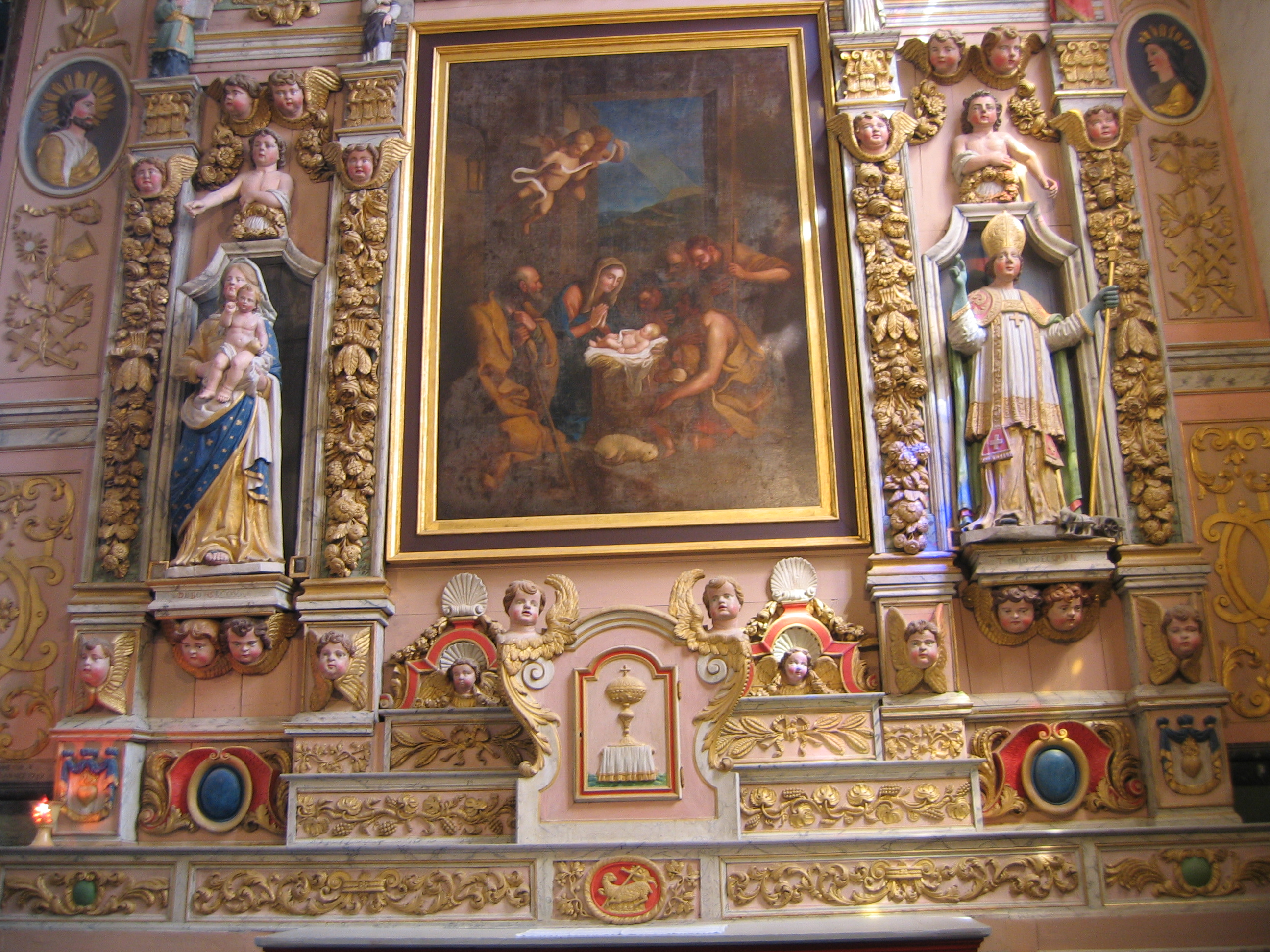 Saint-Thégonnec église détail intérieur